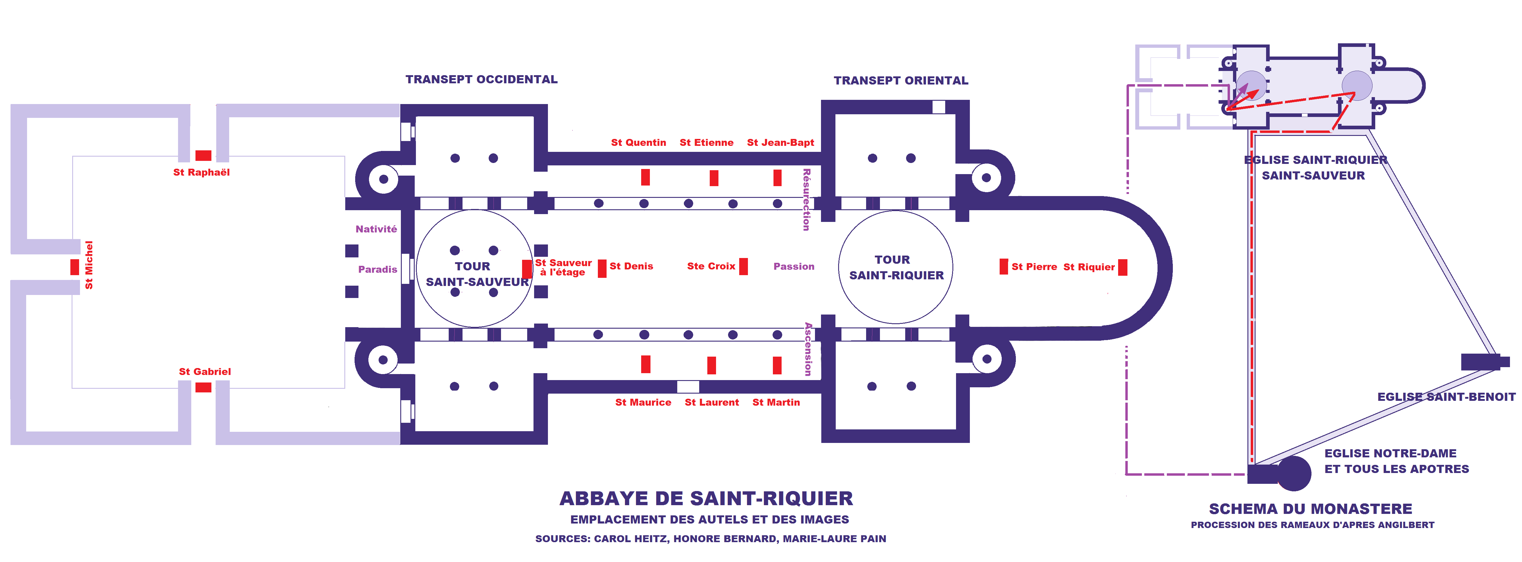 Abbaye de Saint-Riquier, plan